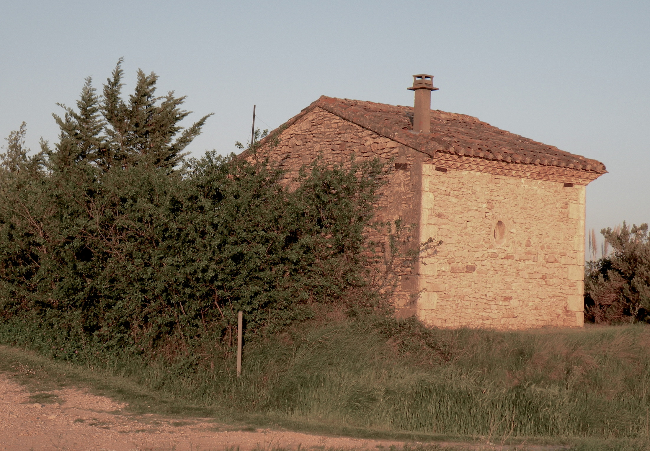 Mazet de Moreau à Nages et Solorgues (Gard)